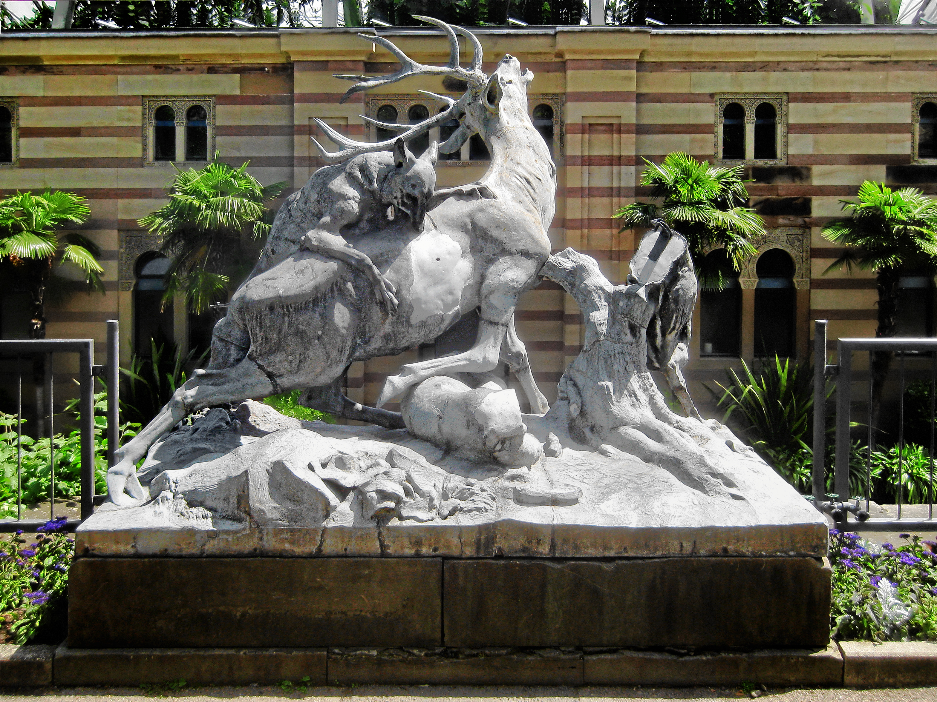 Albert Güldenstein / Guss: Wilhelm Pelargus: Hirsch von Wölfen angefallen (Rückseite), Zinkguss, beschädigt, Entstehungsjahr 1852, Stuttgart, Wilhelma, mitten auf der ersten Stützmauer der Terrassenanlage hinter dem Maurischen Landhaus.